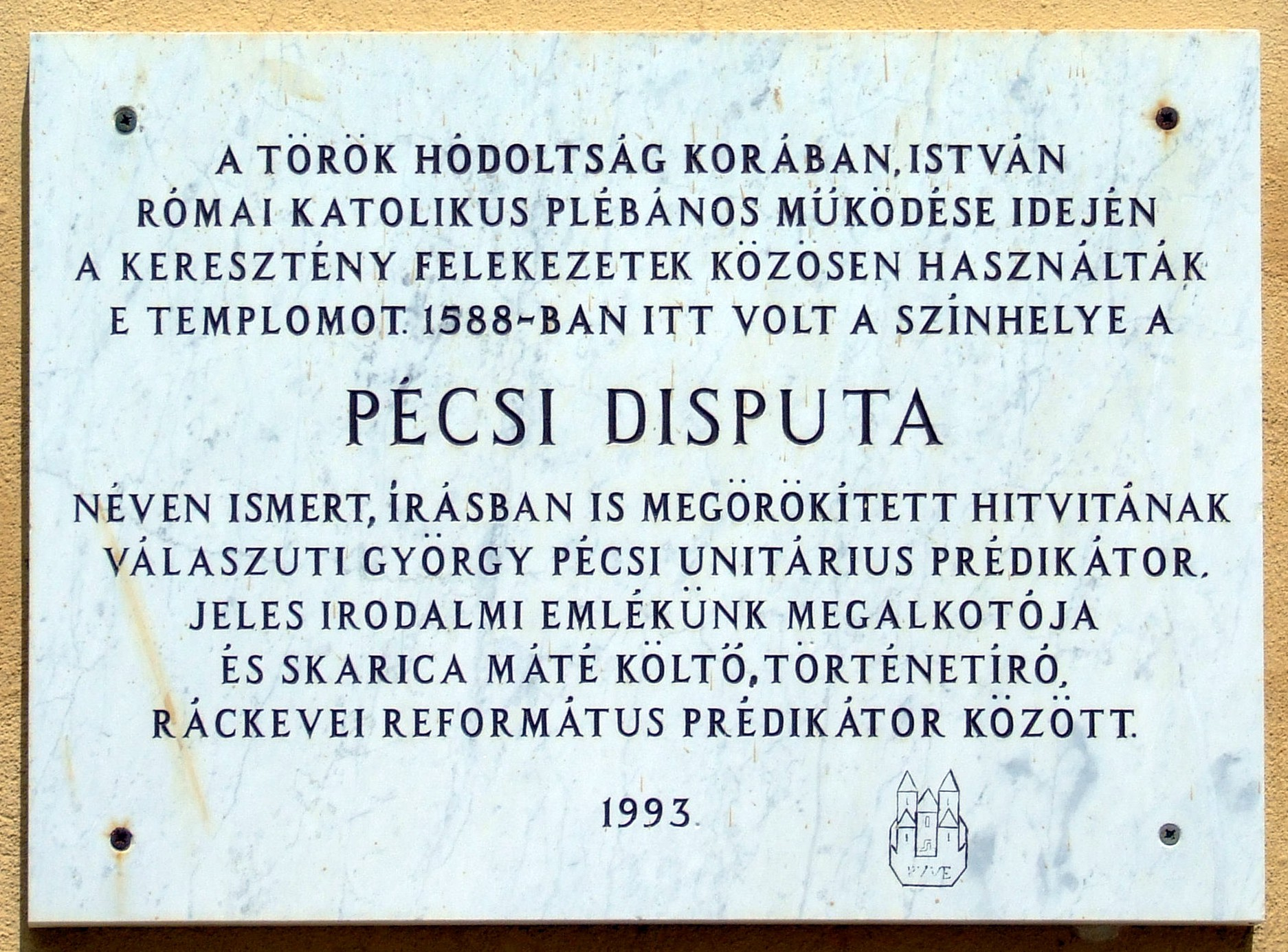 Az 1588-ban itt lezajlott hitvita emléktáblája a pécsi Mindenszentek-templom falán